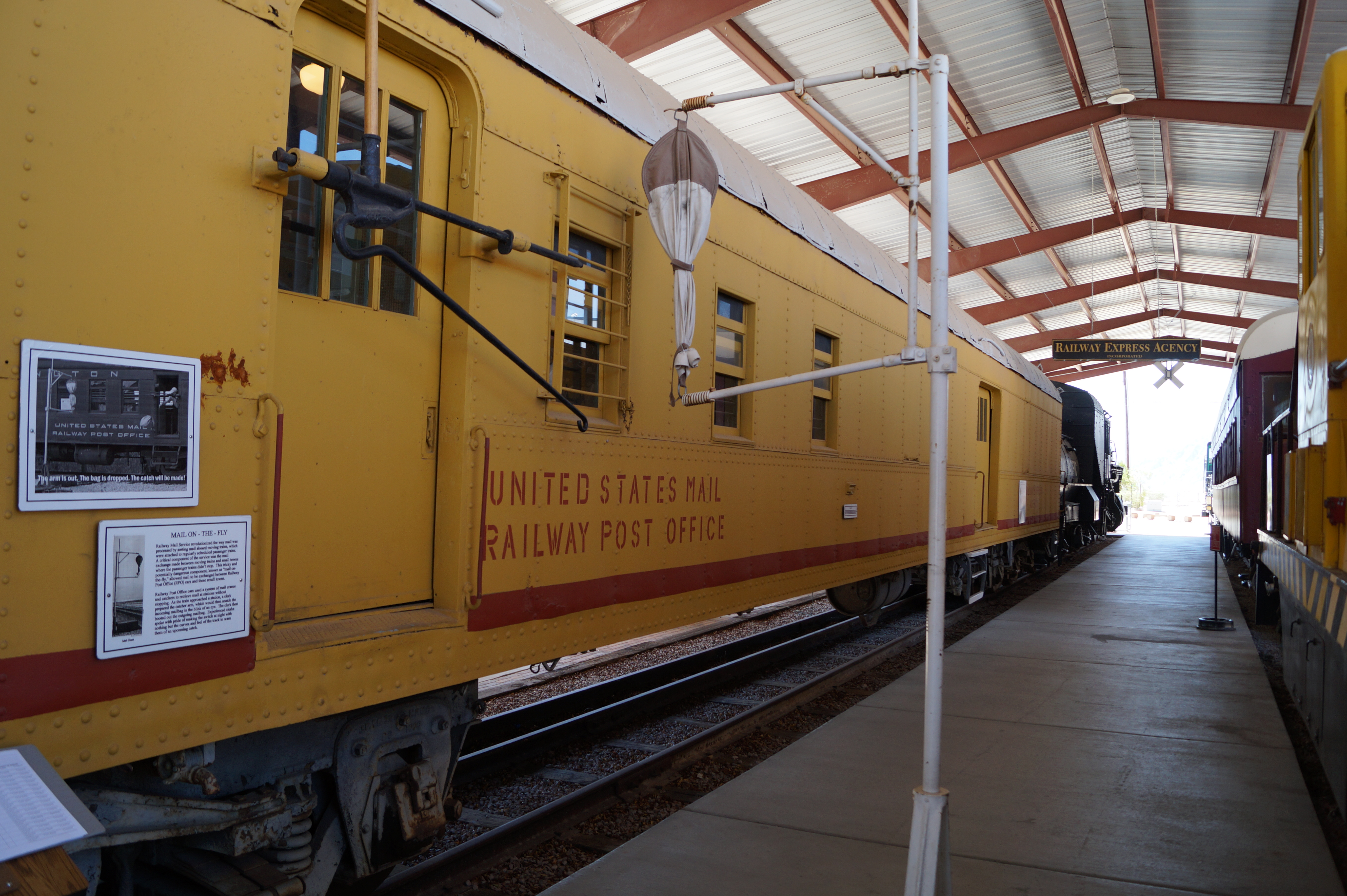 The Nevada State Railroad Museum which is an agency of the Nevada Department of Cultural Affairs. It is located at Yucca Street on the tracks of the historic Union Pacific Railroad branch Henderson-Boulder City near the former Boulder City Railroad Yards where the Hoover Dam construction equipment was unloaded in the 1930s.